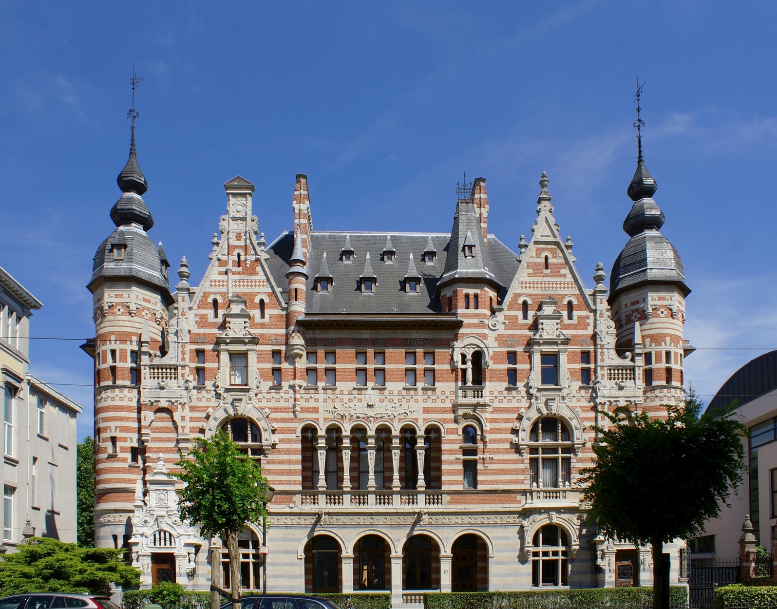 Geheel van drie eclectische burgerhuizen "In de Sterre, de Sonne en de Mane". Gelegen aan de Cogels-Osylei 25-27-29 te Berchem (Antwerpen). Ontworpen door architect Jos Bascourt (Joseph Hyacinthe Marie Corneille - ).